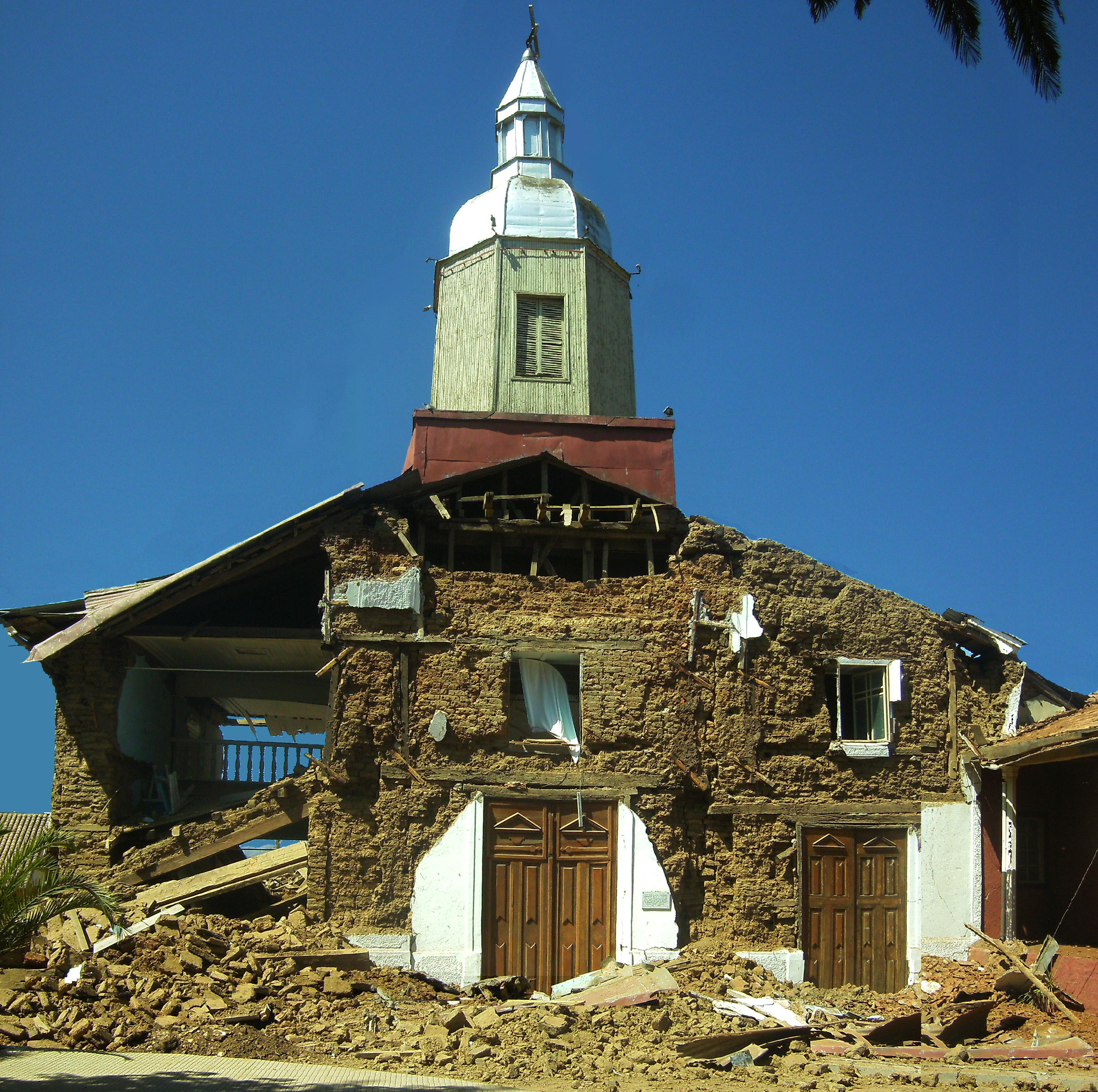 Iglesia Nuestra Señora del Rosario de Curepto después del terremoto del 27 de febrero de 2010. This is a photo of a national monument in Chile: 645